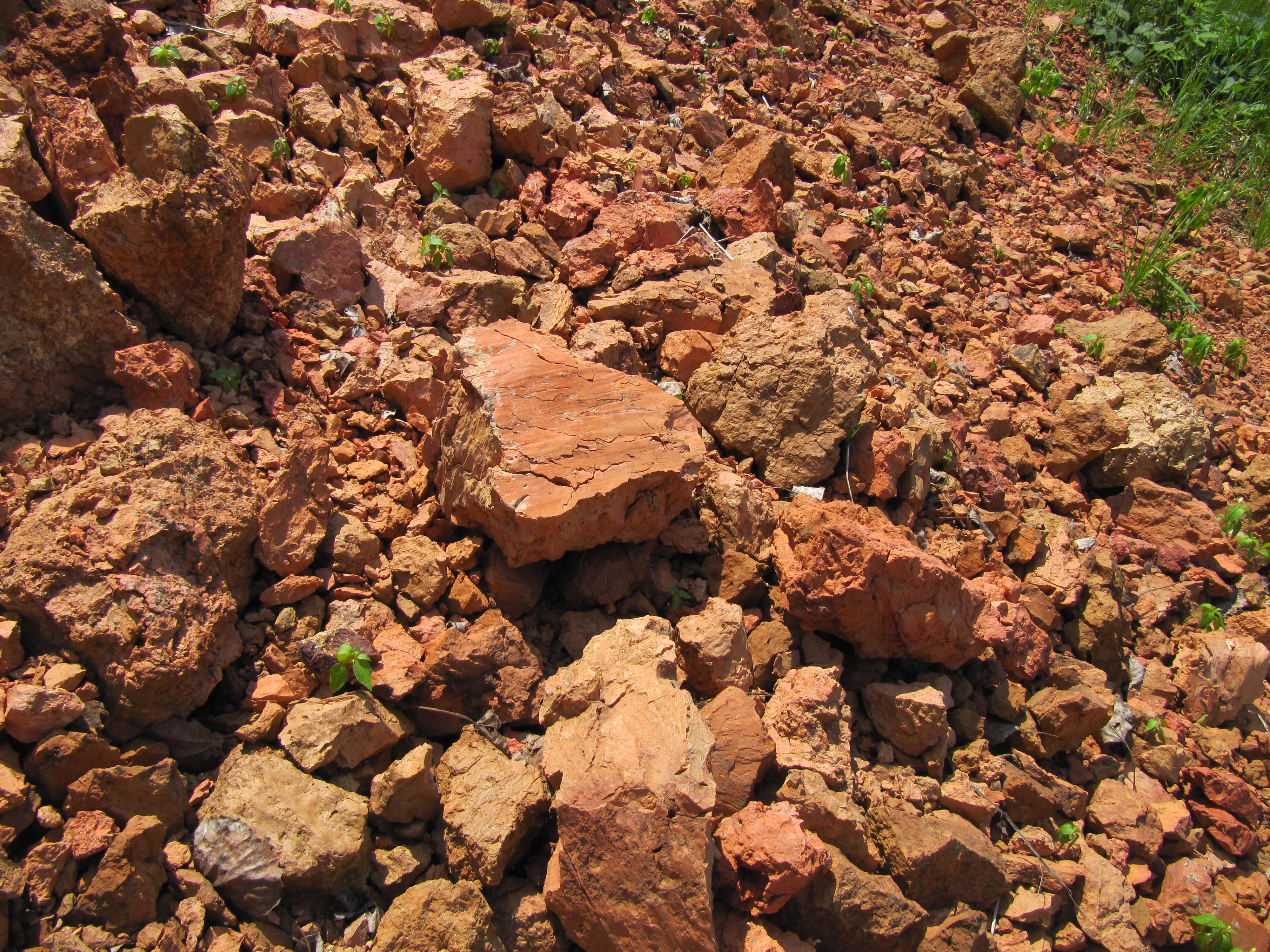 Medlovický lom